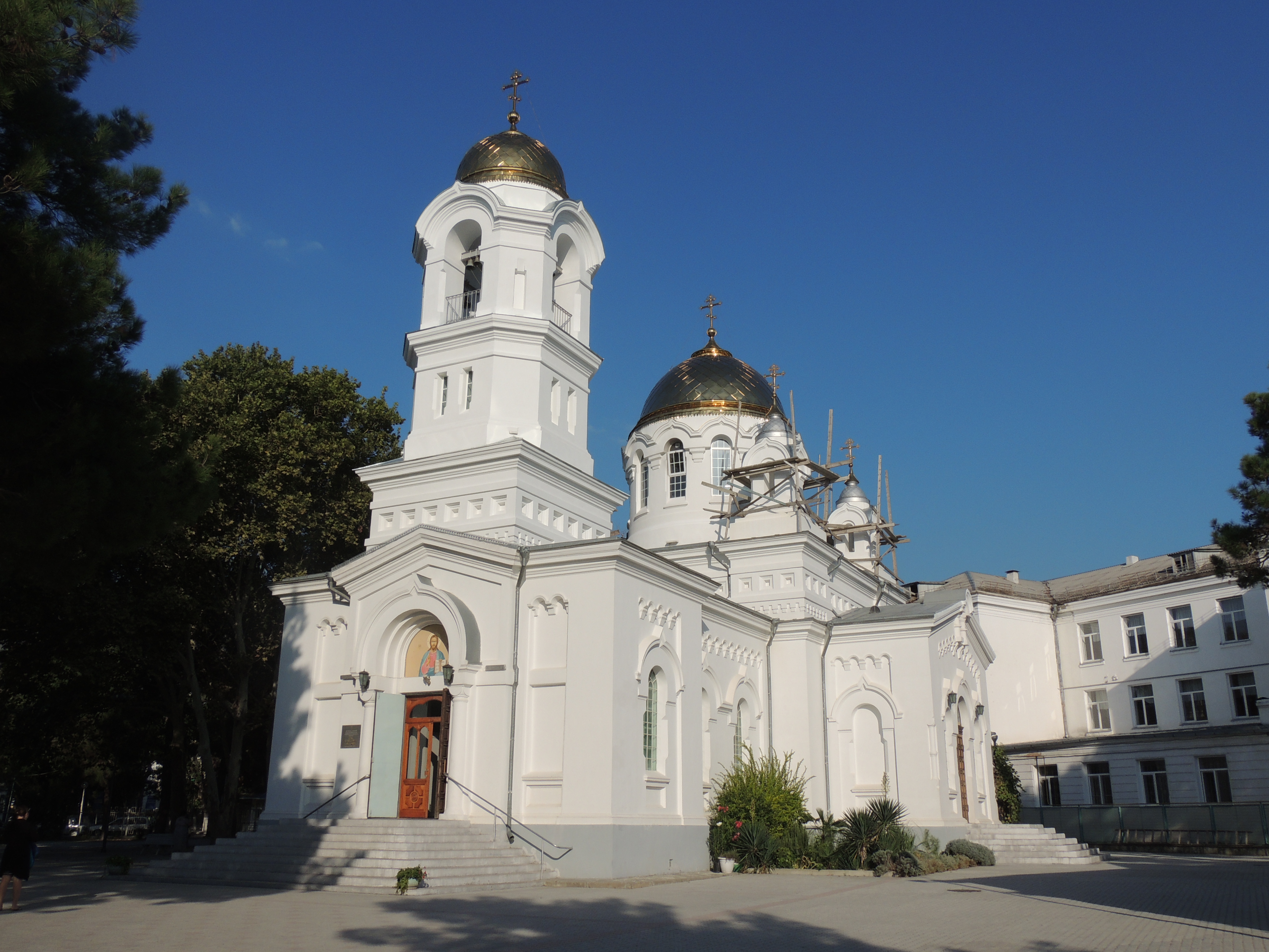 первомайская ул., 4, во дворе школы № 3. На реконструкции. Время работы: с 9:00 до 18:00 в богослужебные дни с 7:00 до 20:00